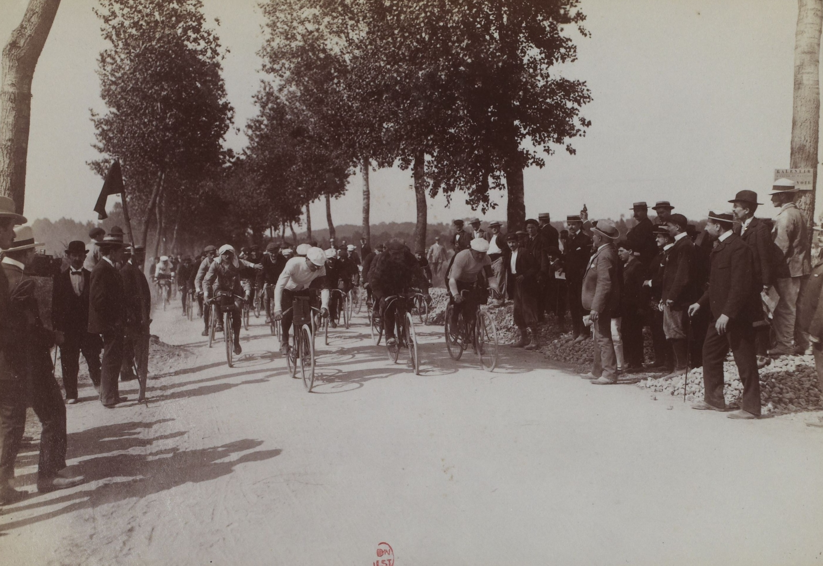 [Collection Jules Beau. Photographie sportive] : T. 22. AnnÃ©e 1903 / Jules Beau : F. 18v. Tour de France, 1er - 19 juillet 1903